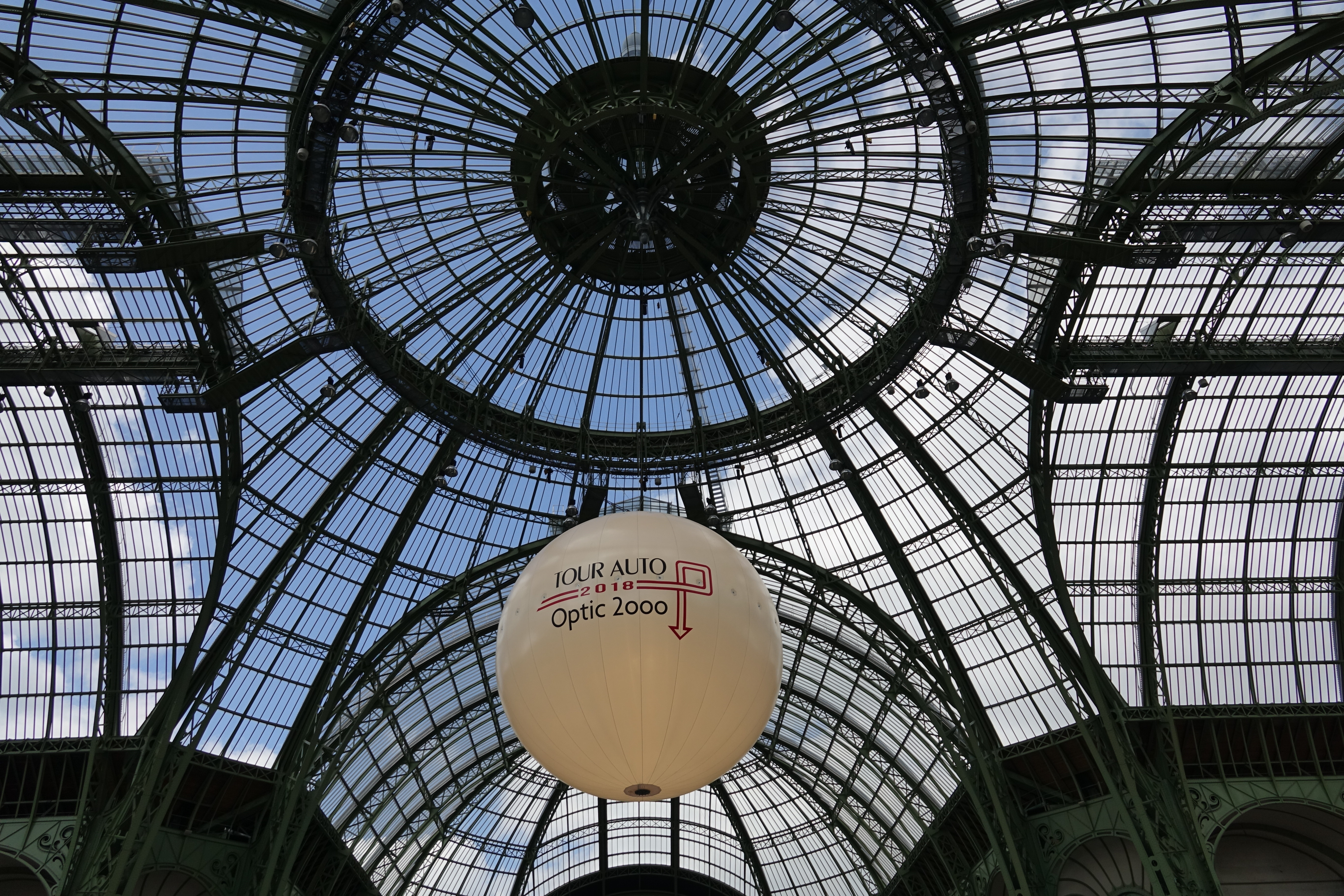 Tour Auto Optic 2000 - Grand Palais